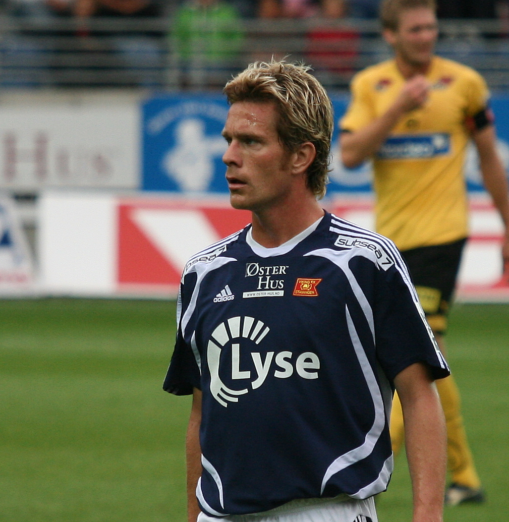 Ragnvald Soma